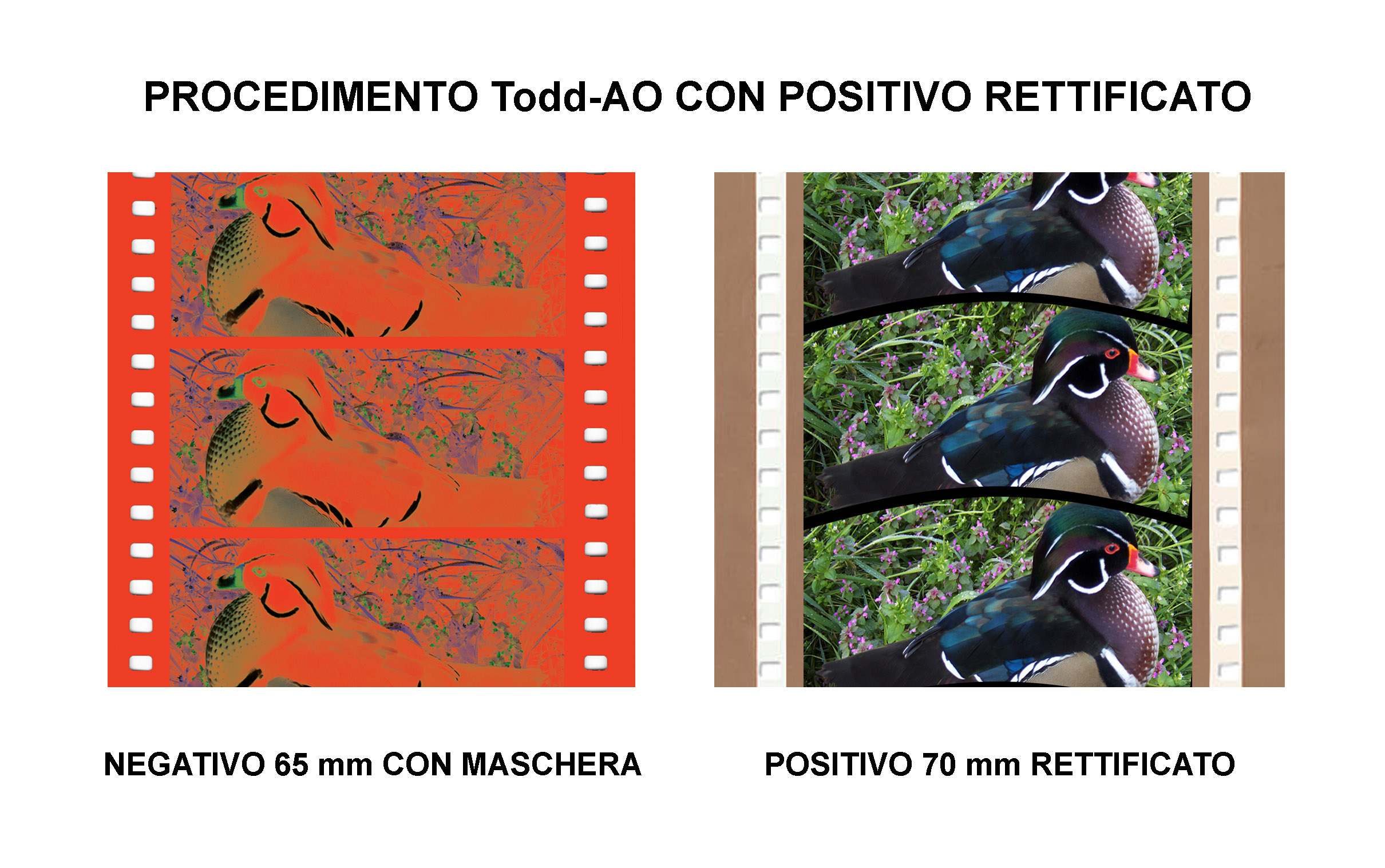 Sistema cinematografico Todd-AO: stampa da negativo a positivo da proiezione "rettificato".